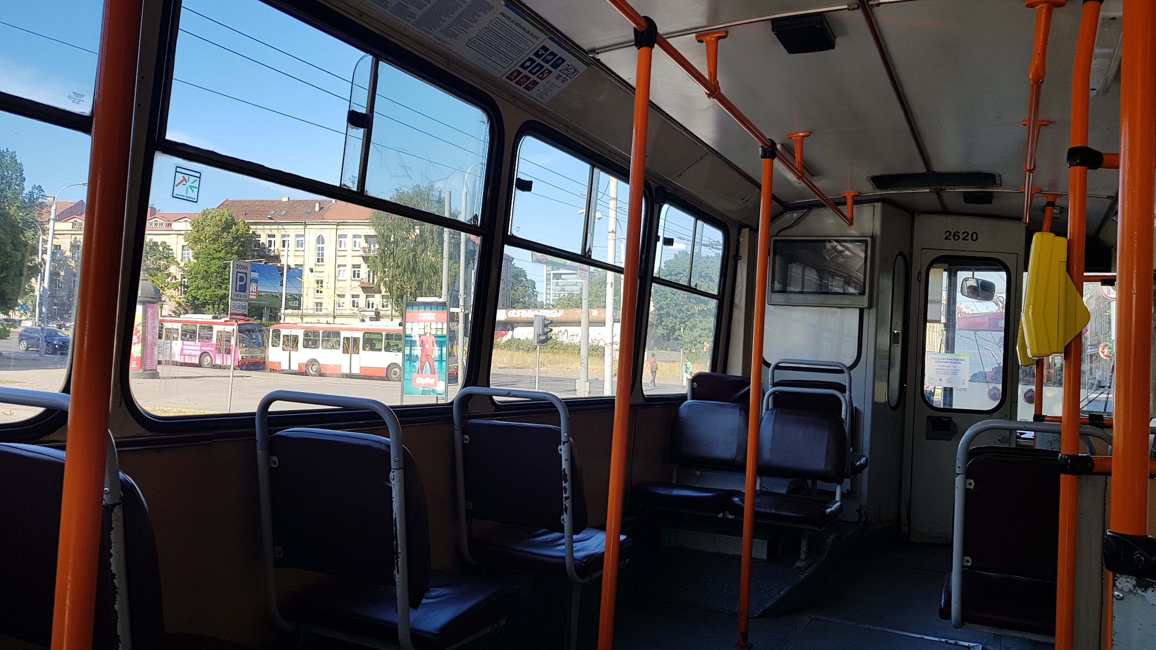 Škoda 14Tr sisältä (matkustamo) Vilnassa, Liettuassa